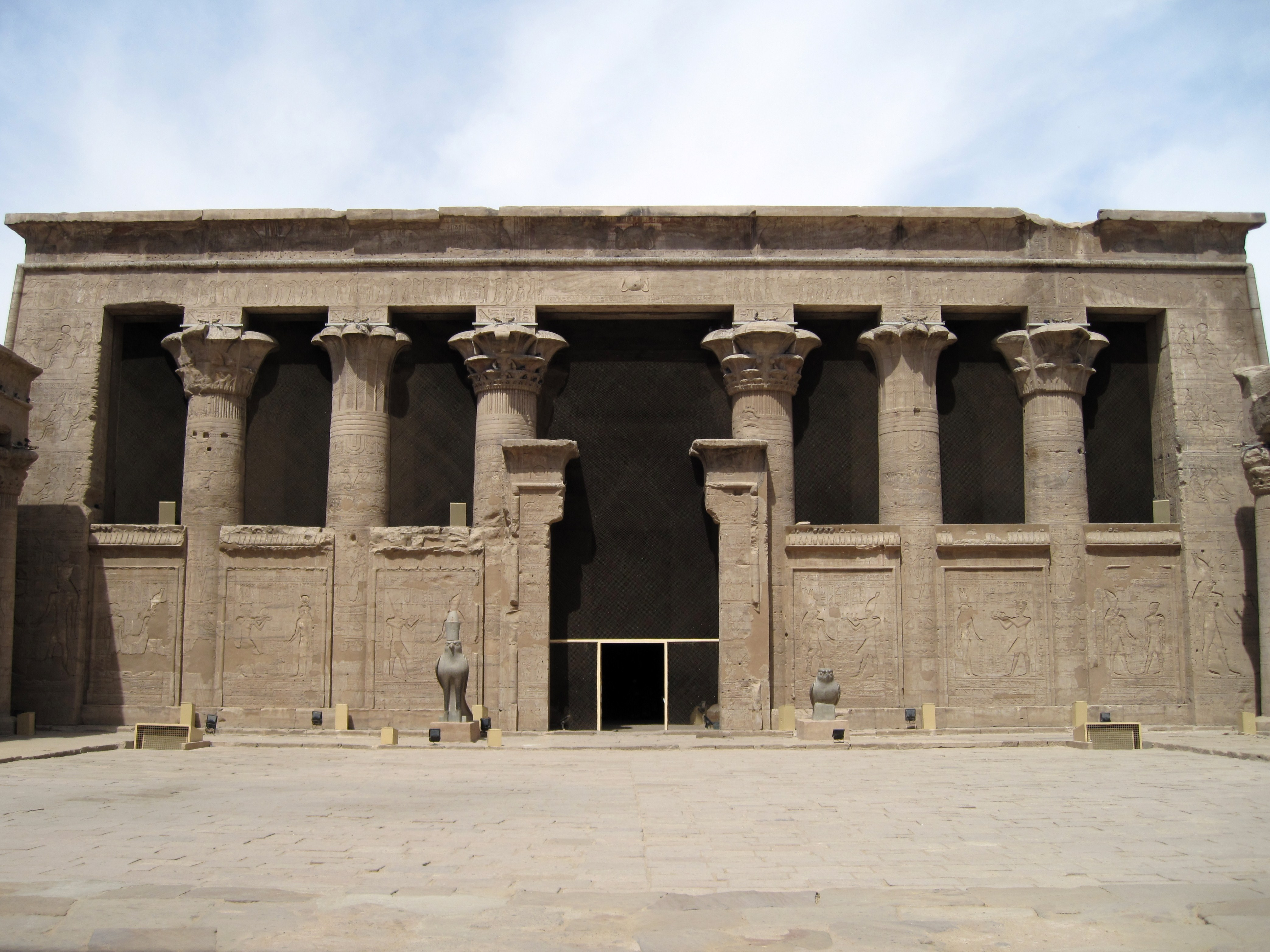 Fassade des Pronaos im Tempel von Edfu, Ägypten